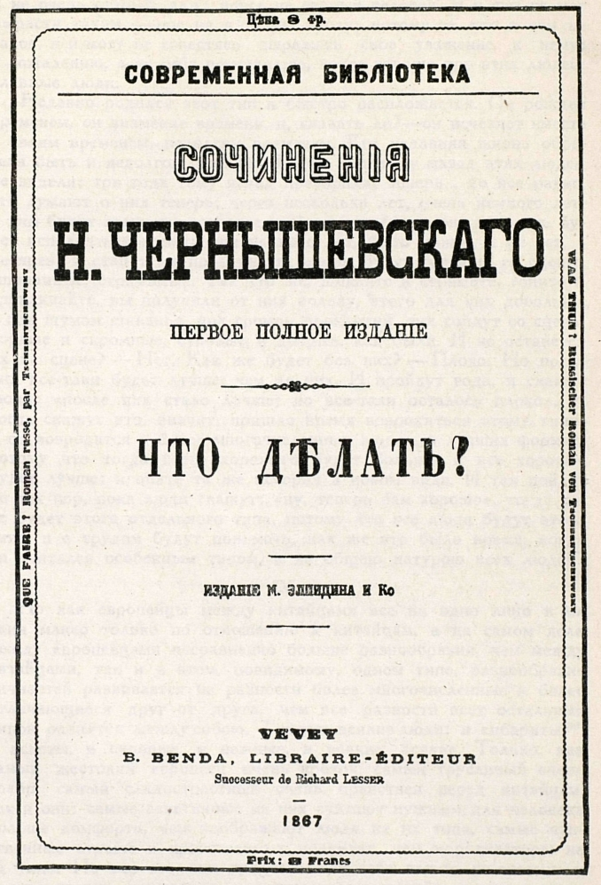 Обложка первого издания романа Чернышевского "Что делать?" в виде отдельной книги. Женева, 1867 год.